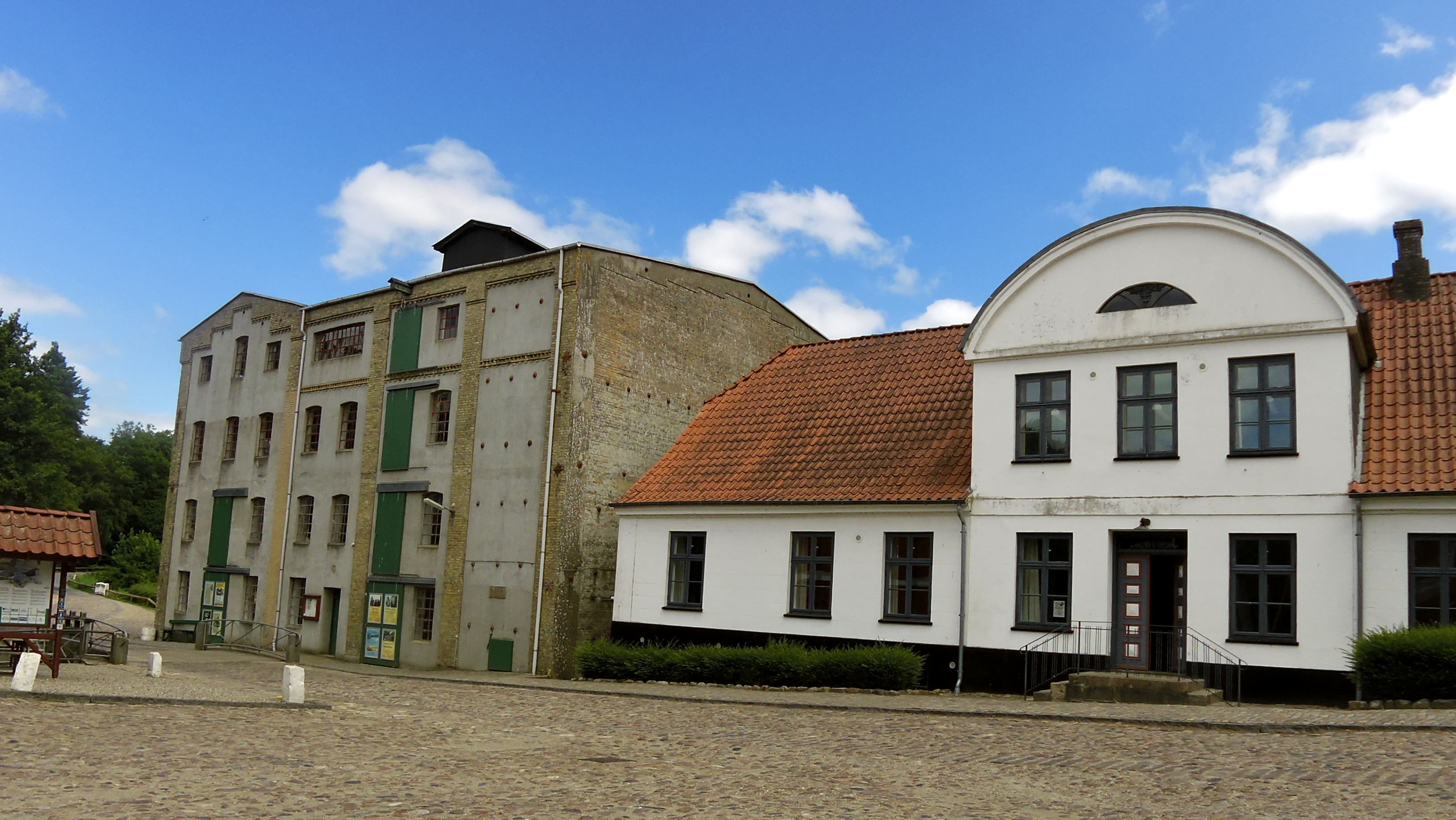 Møllen & Møllerhuset, Tørning Mølle